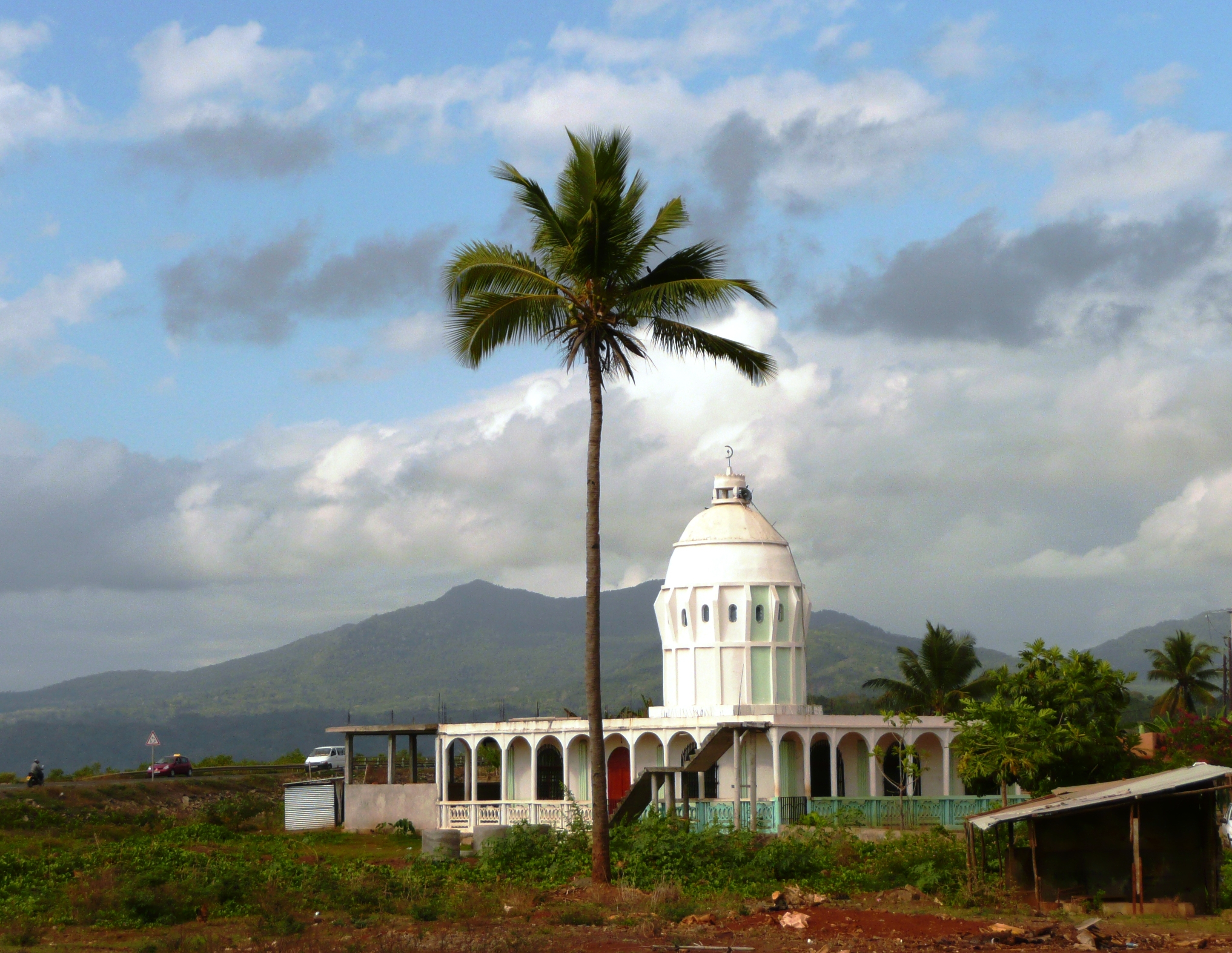 mosquée